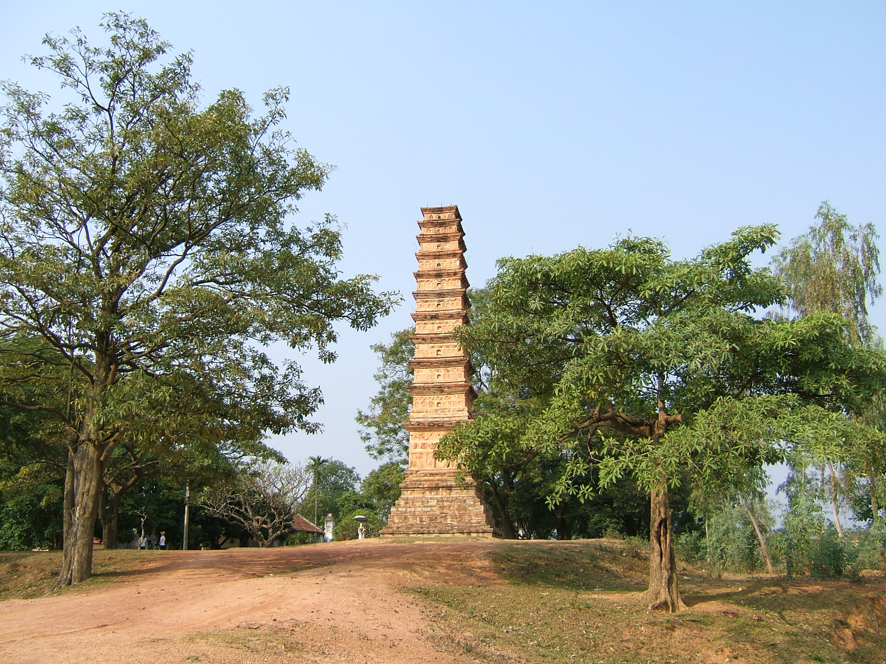 Tháp Bình Sơn được xây vào thời nhà Trần ở Lập Thạch, Vĩnh Phúc